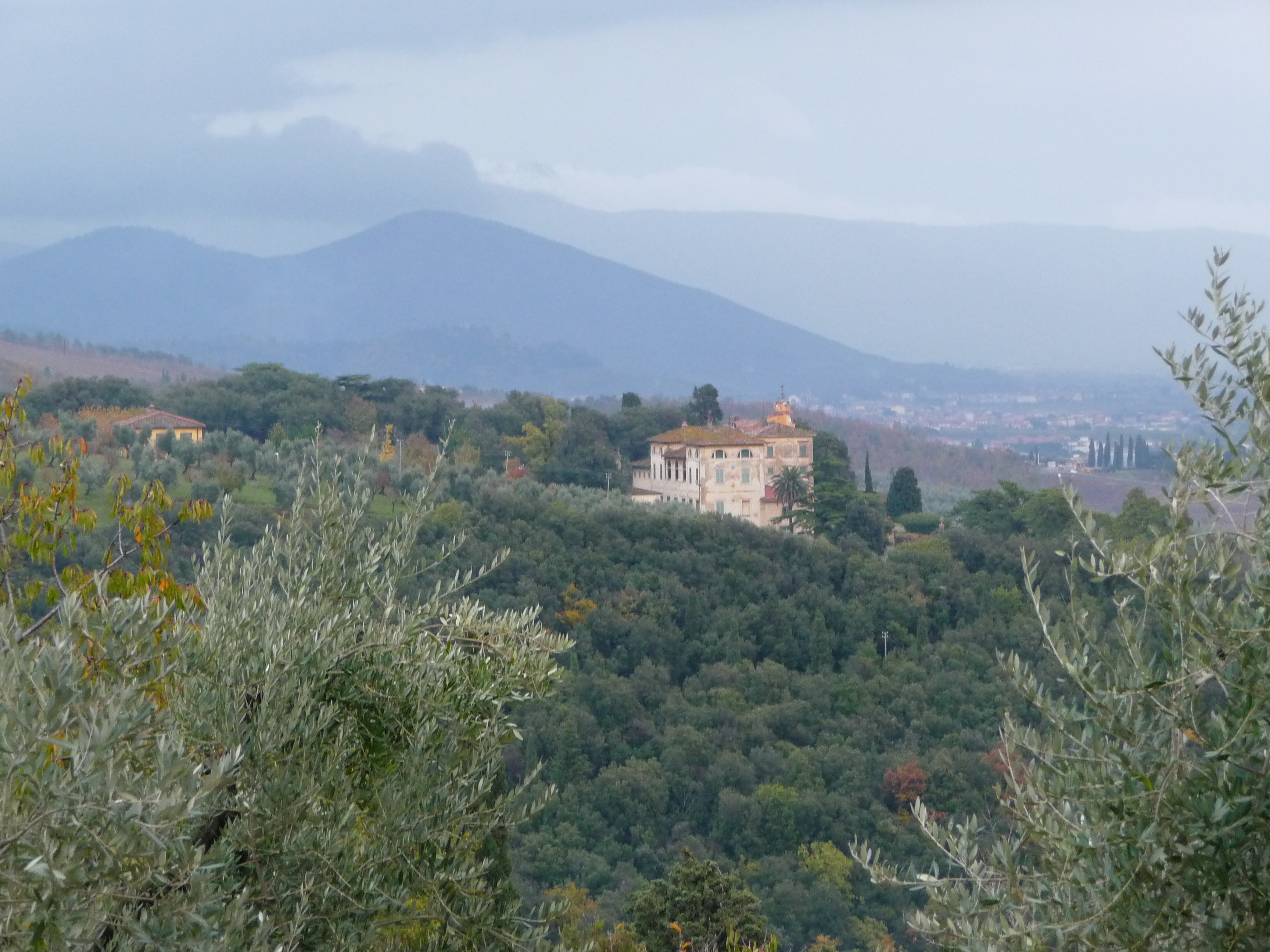 La villa di Celle vista da Nord Ovest in inverno